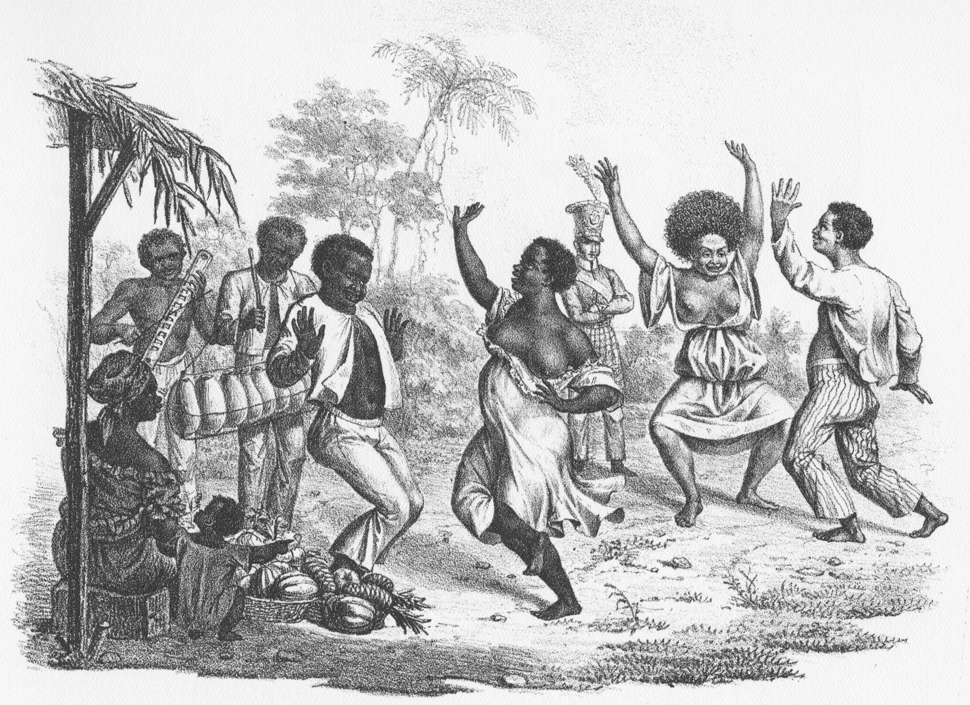 "Die Baducca in S. Paulo", detail of "Bilder aus dem Menschenleben"